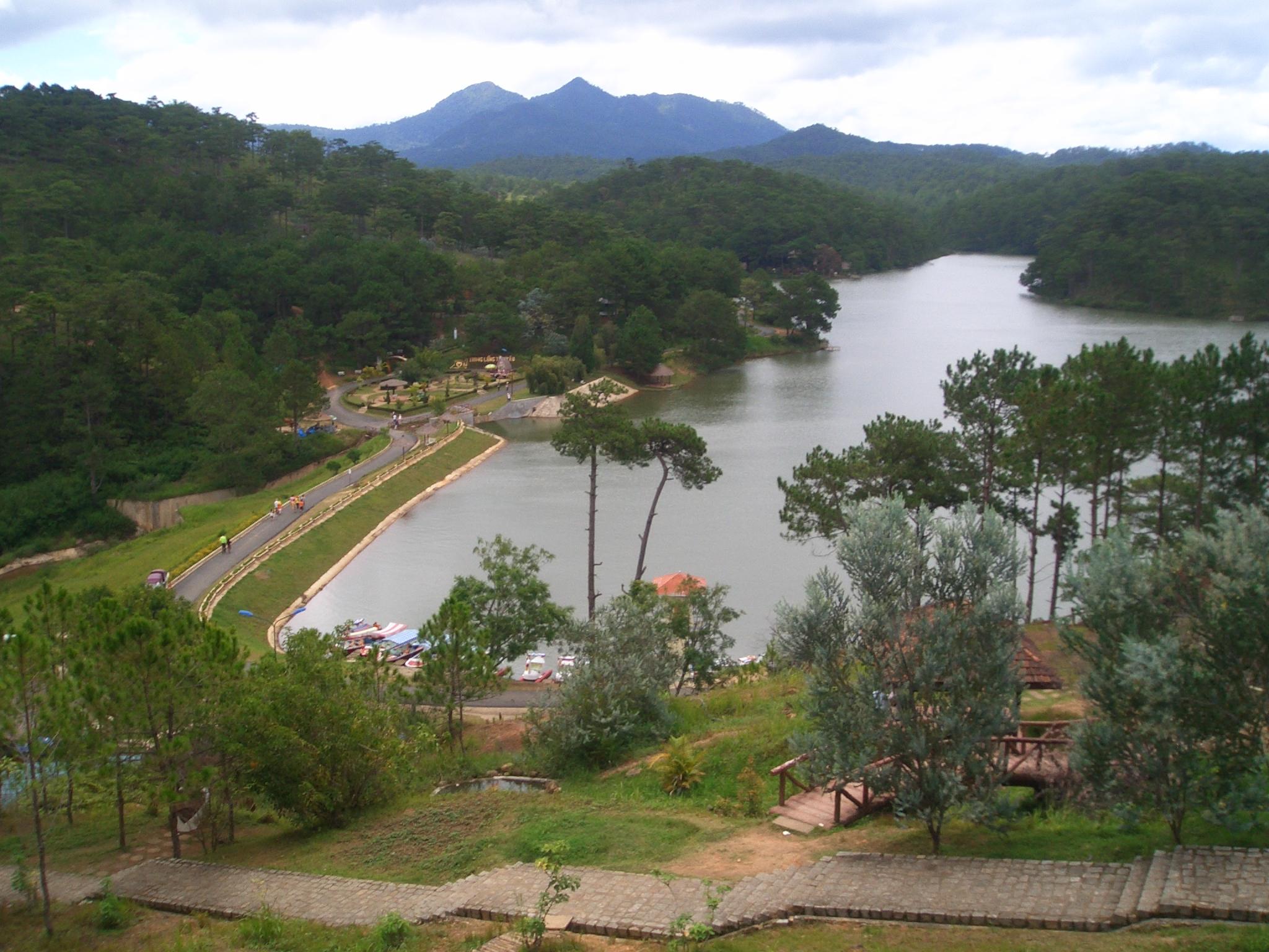 Toàn cảnh Thung lũng Tình Yêu (chụp từ trên cao).